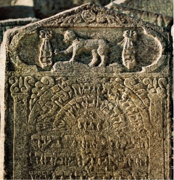 Náhrobek Jissachara Beer Tellera s medvědem symbolizujícím jeho jméno.